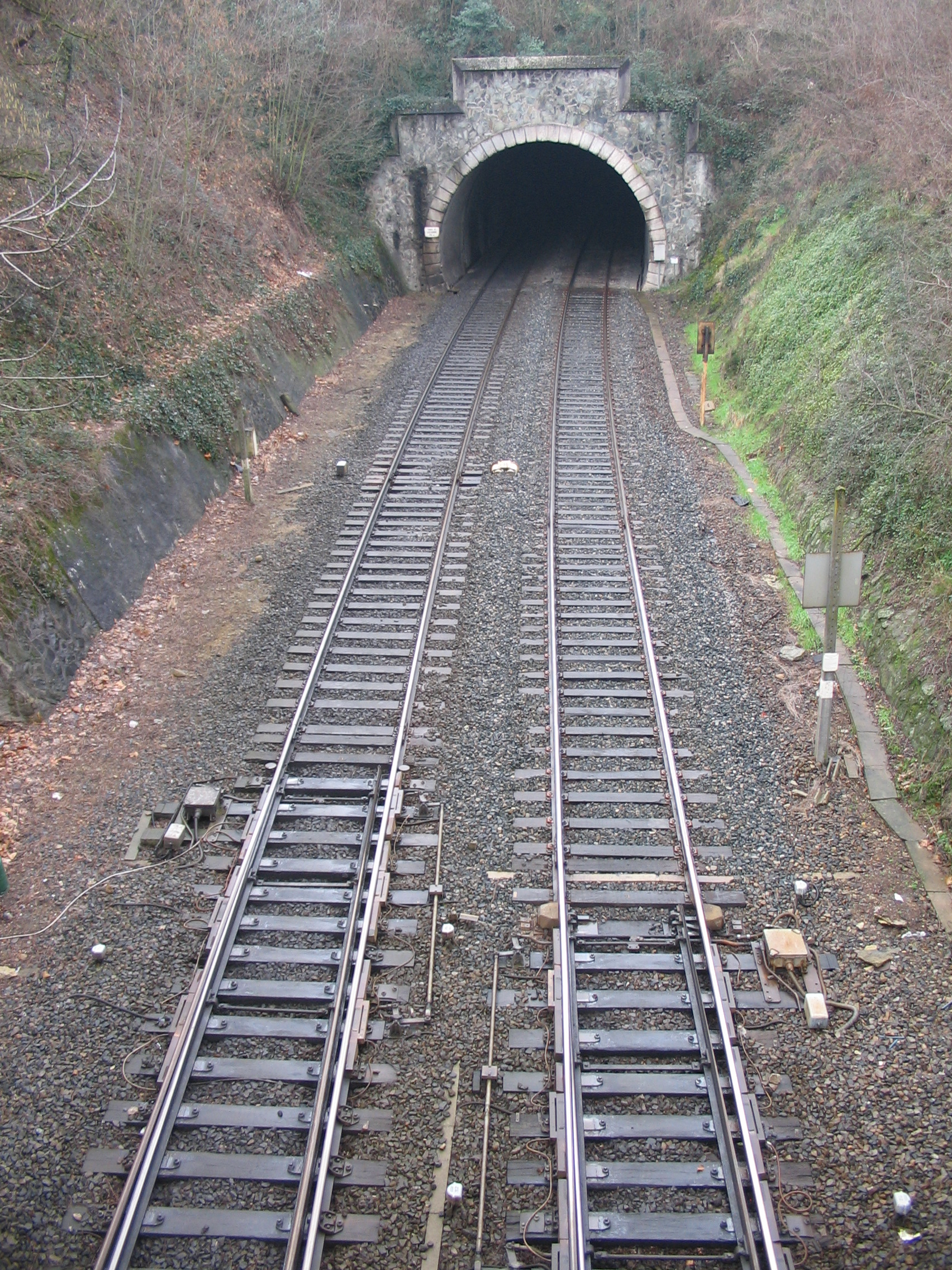 Tunnel à la sortie de la gare de Lozanne (Rhône), avant bifurcation - direction St-Germain-des-Fossés ou Paray.